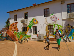 הכניסה לפקולטה לאמנויות - המדרשה